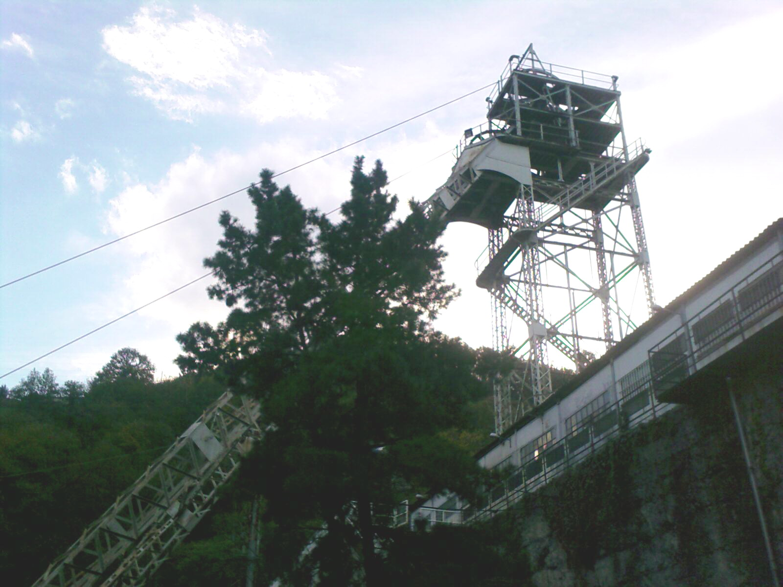 Castillete del Pozo Barredo, Mieres, Asturias, España